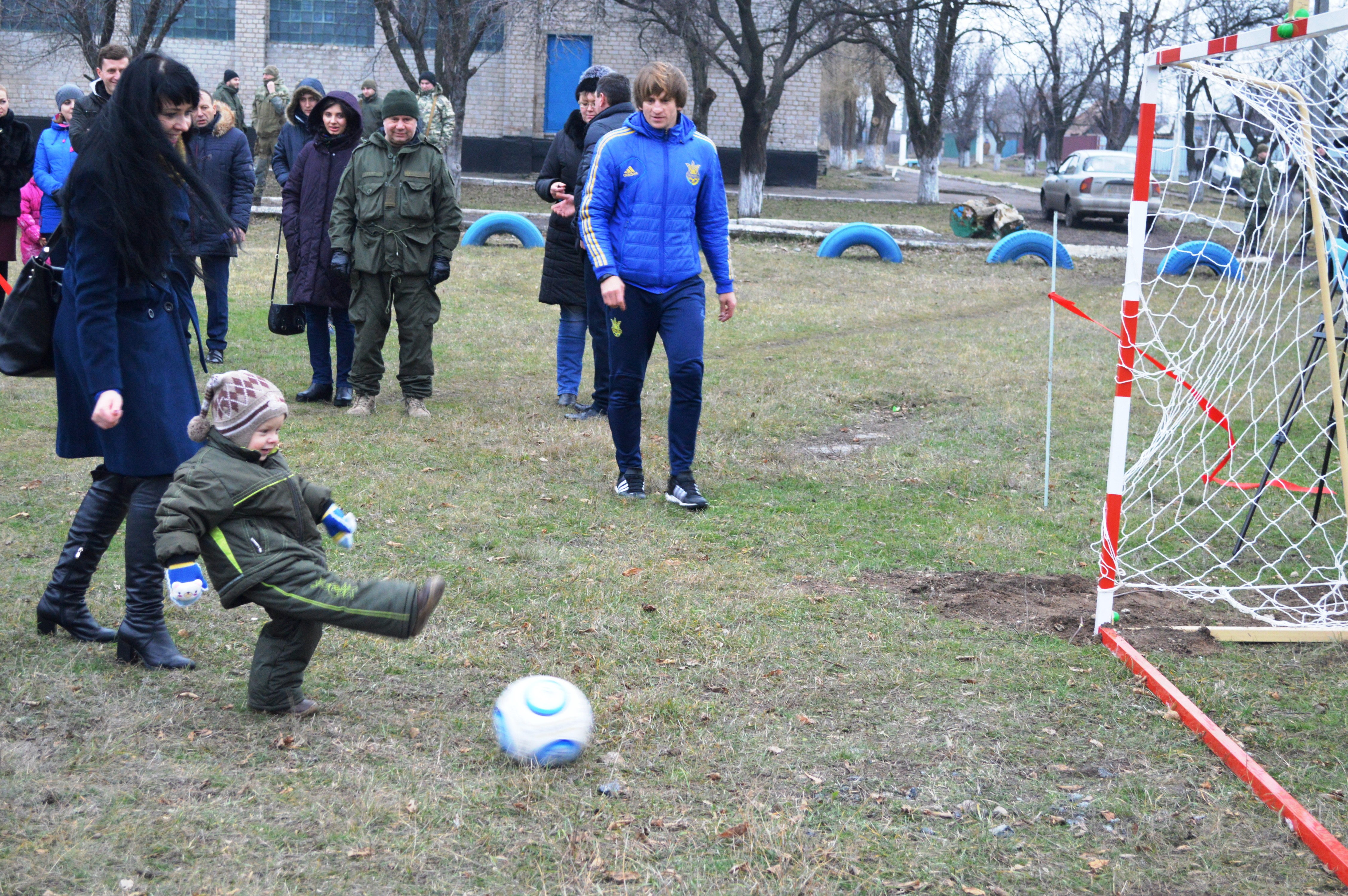 Відкриття майданчика у Комишувасі